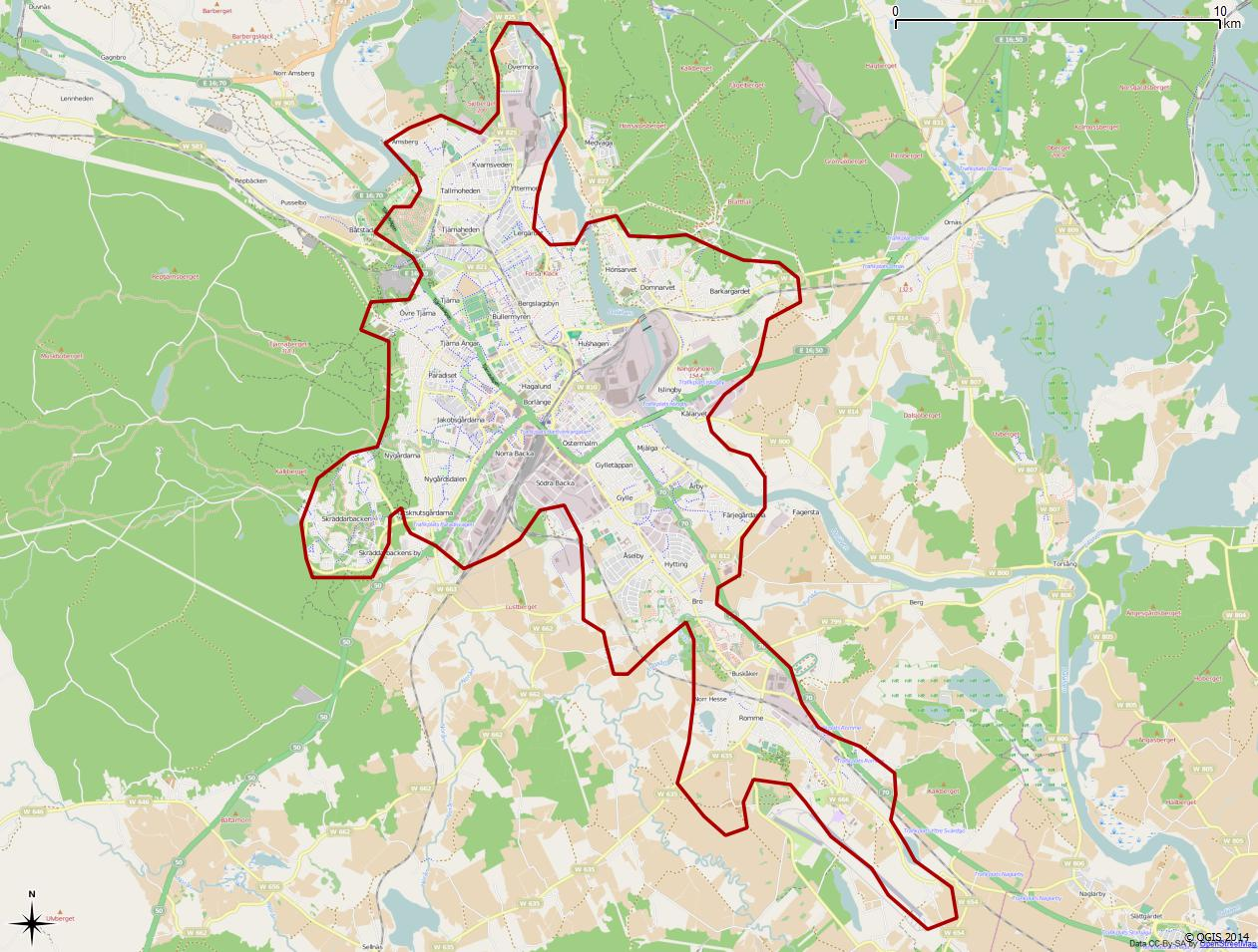 Tätorten Borlänges gränser 1990 enligt Atlas över rikets indelningar 1992.